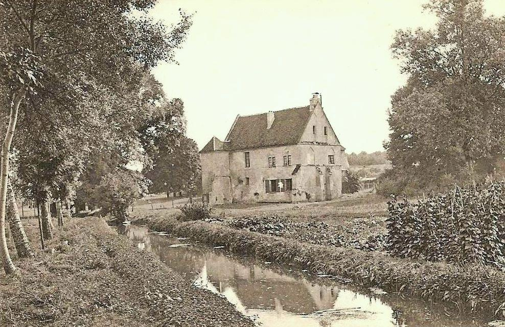 Le bâtiment qui subsiste de l'ancienne grange cistercienne, vue depuis le nord-est.